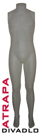 Oficiálne logo Divadla Atrapa